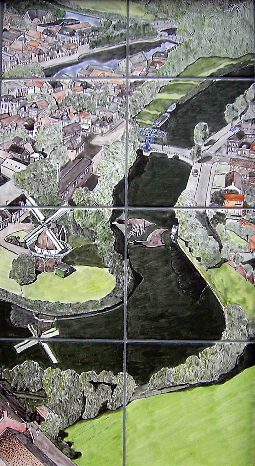 Guido van Driel,2004